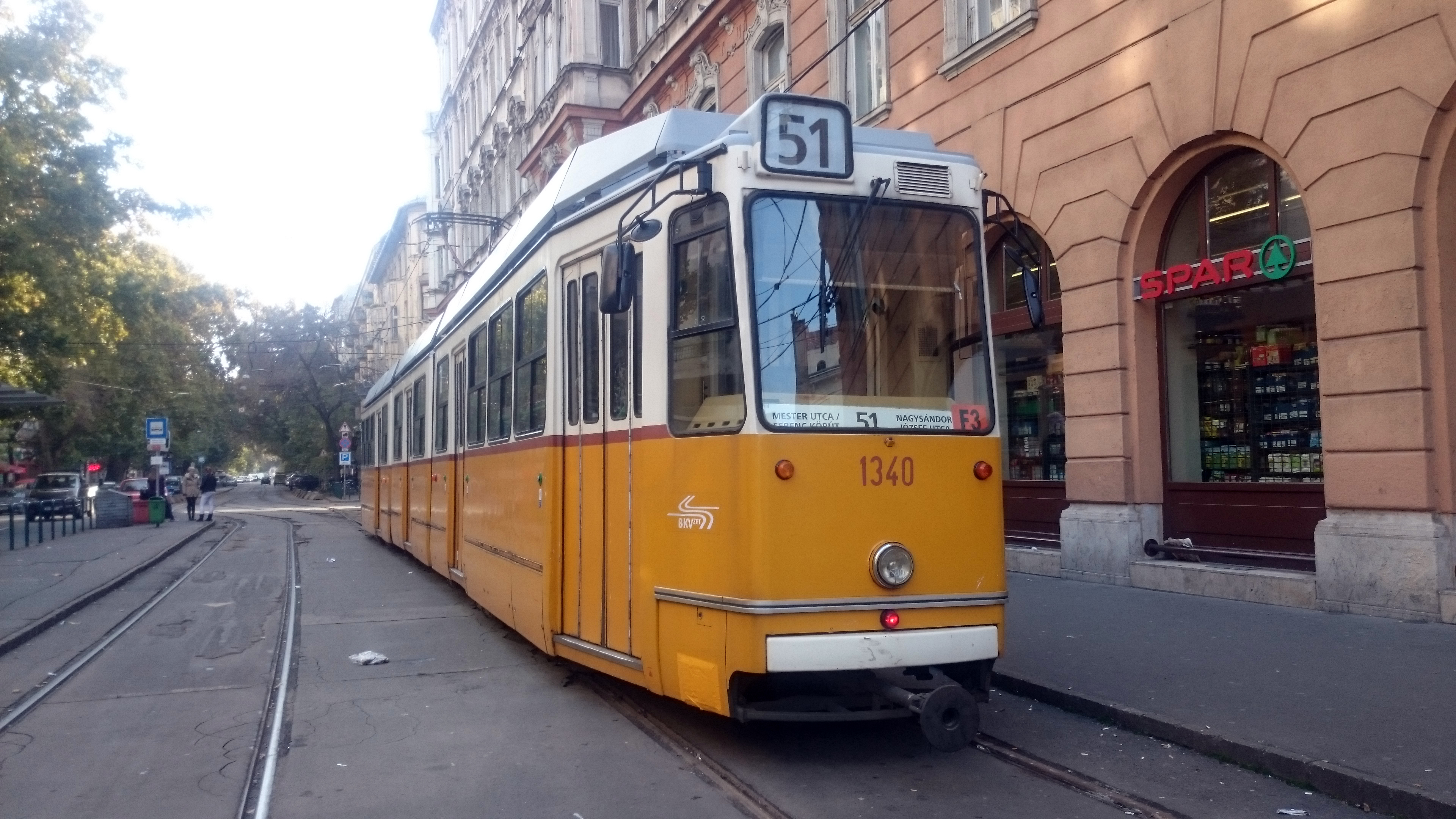 KCSV-7 típusú villamos (psz. 1340) az 51-es vonalon, a Ferenc körúti végállomáson